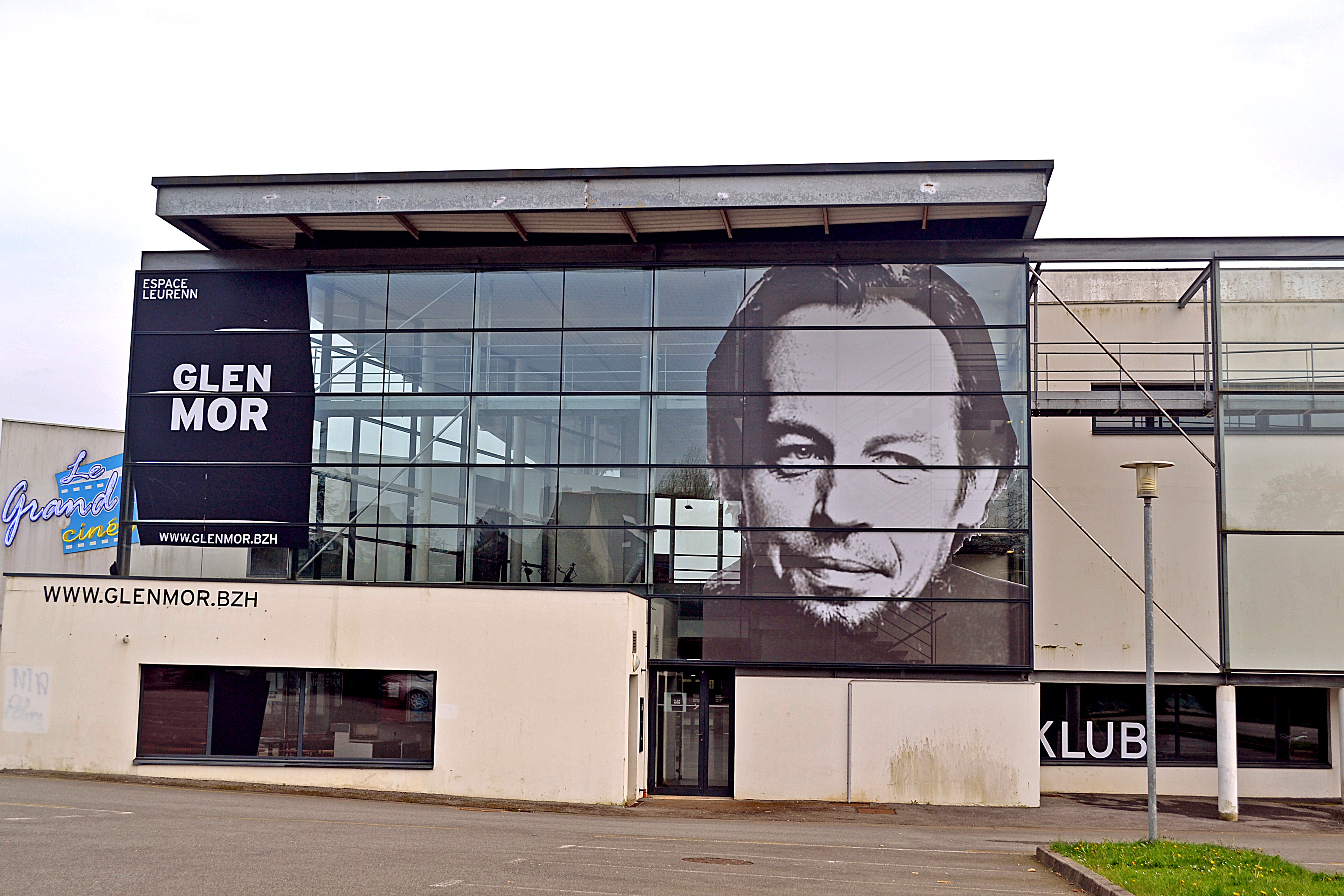 Espace culturel Glenmor à Carhaix Plouguer depuis 2001.